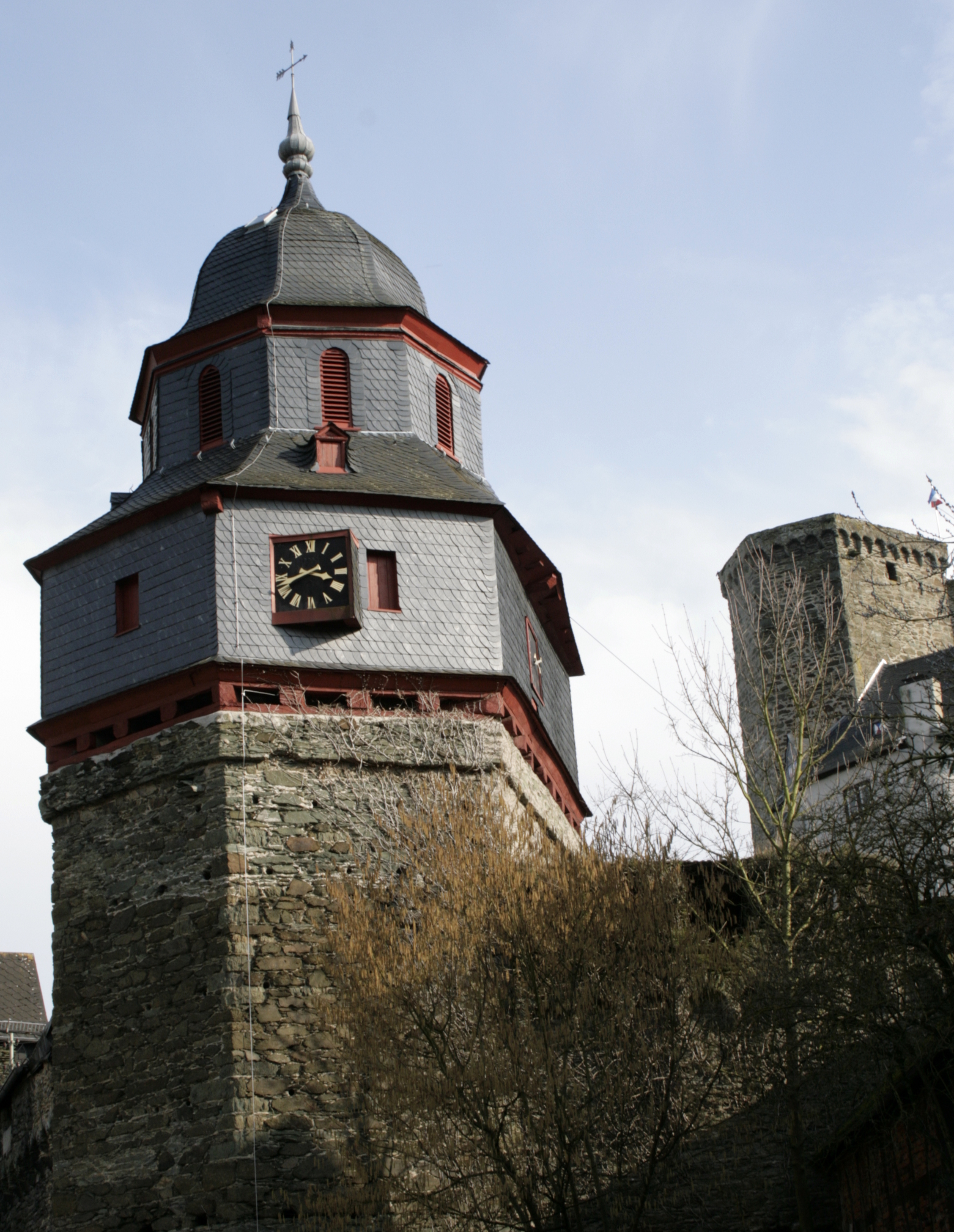 Glockenturm der evangelischen Kirche in Runkel, Deutschland, ehemals Wachturm der Stadtmauer